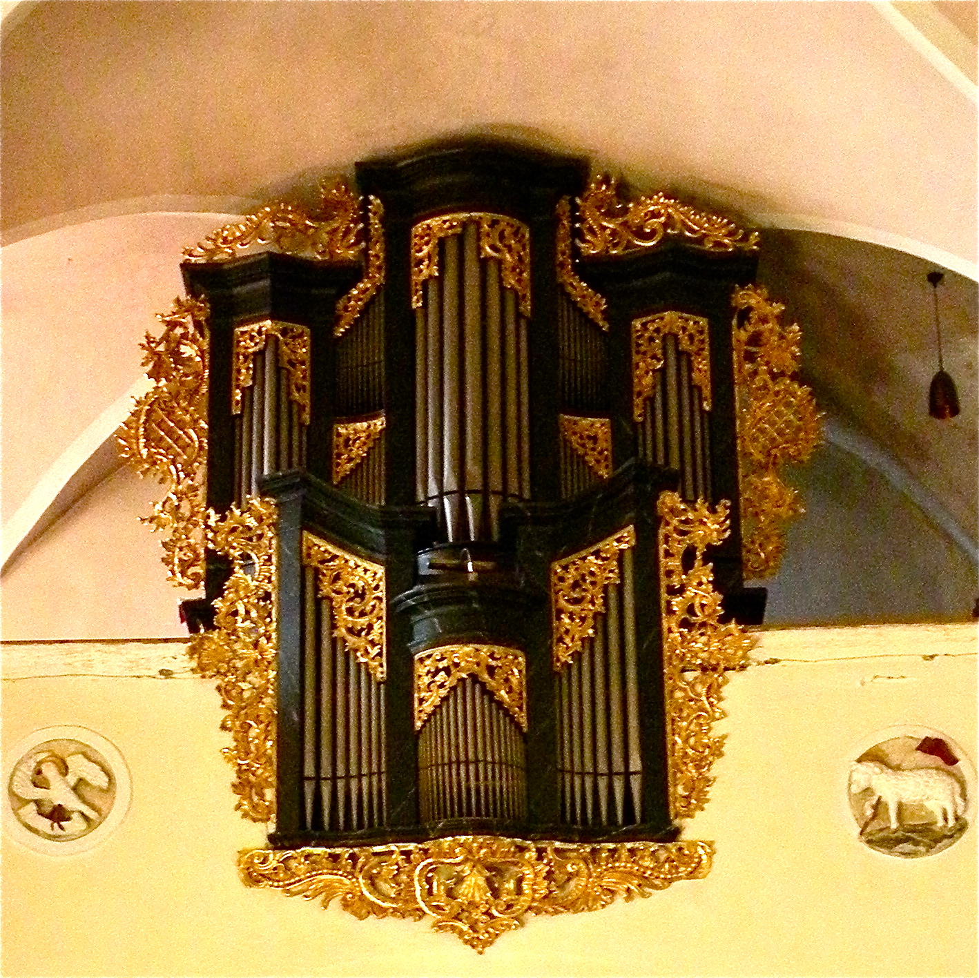 Franz Lorenz Richter Orgel in der Pfarrkirche in Münzbach im Bezirk Perg in Oberösterreich